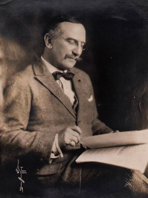 Portrait de Léon Bakst